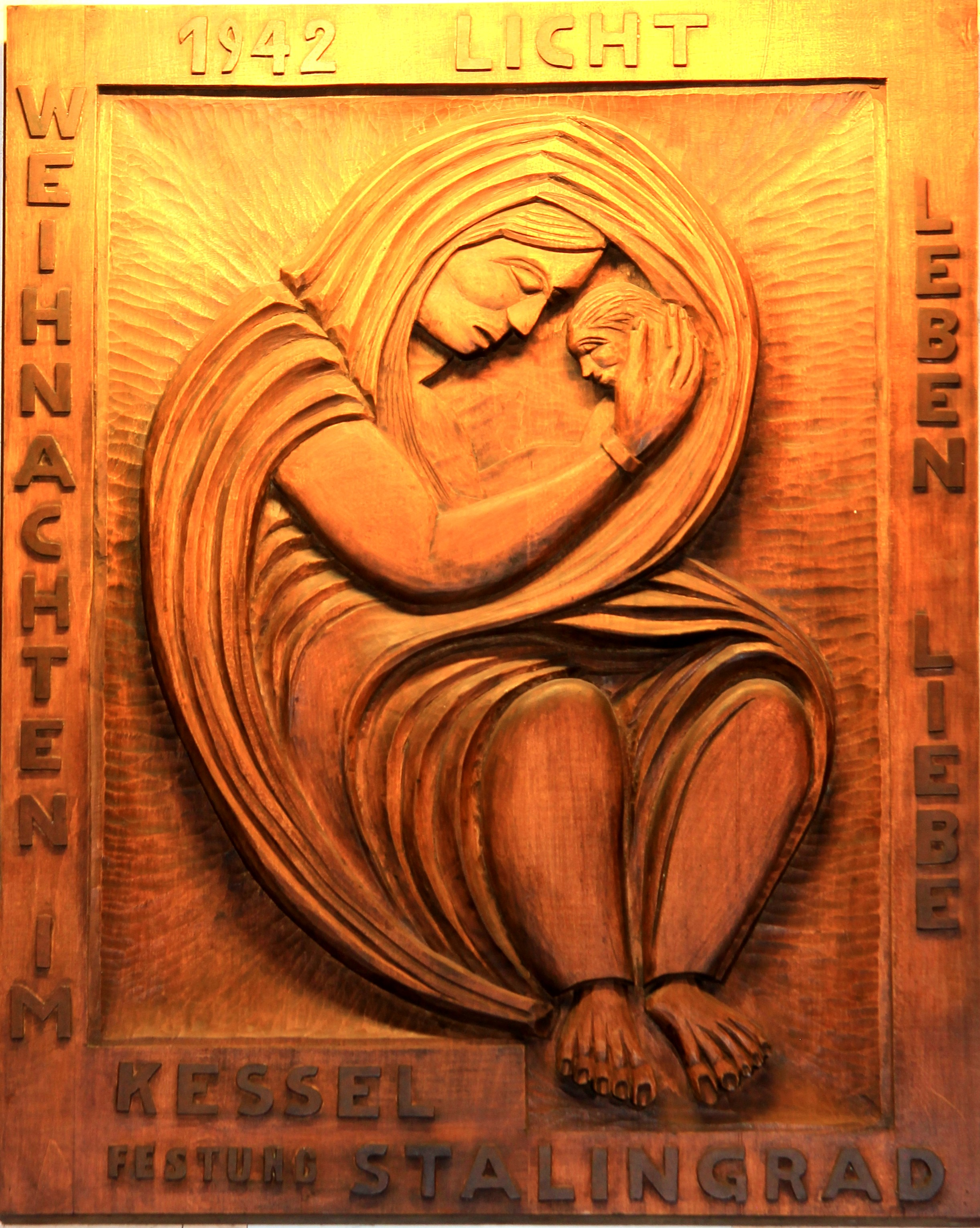 Stadtpfarrkirche hl. Stephan